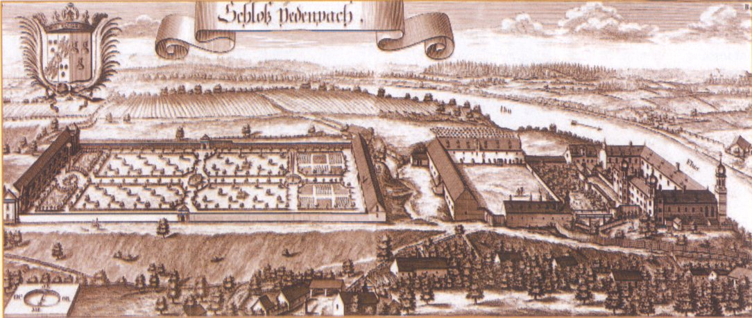 Schloss Jettenbach, Holzstich von Michael Wening um 1700